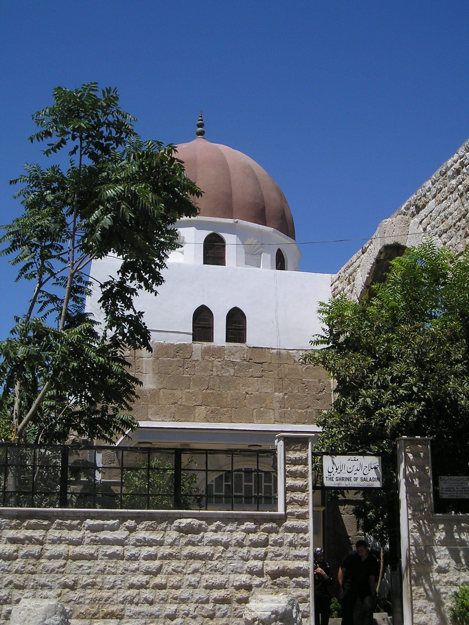 Tumba de Saladino en: Damascus, Syria - the tomb of Saladin near the northwestern corner of the Umayyad Mosque sl: Damask, Sirija - Saladinova grobnica ob severozahodnem vogalu mošeje Omajadov I took the photo myself.